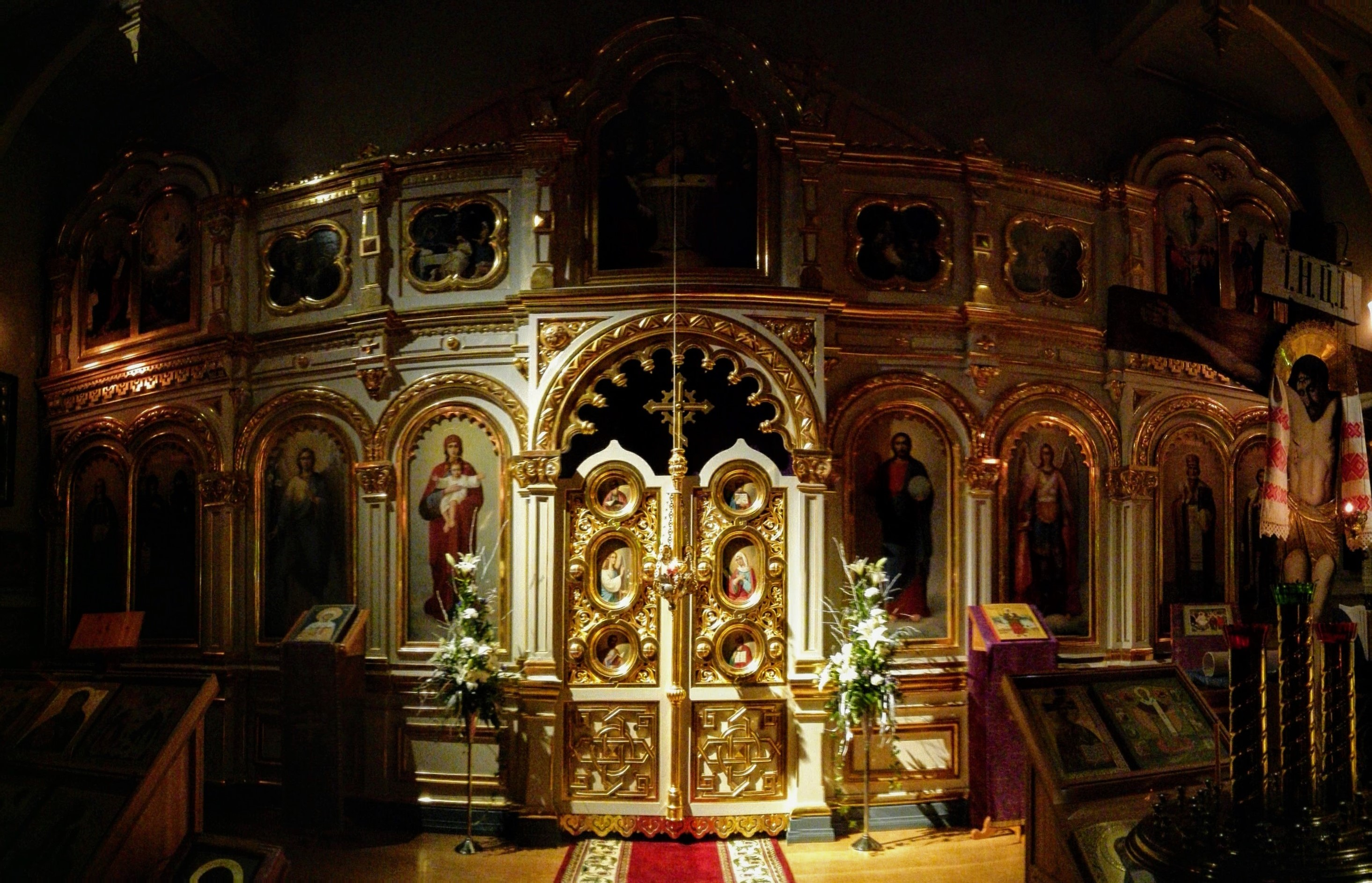 Pyhän Nikolaoksen katedraali Kuopiossa